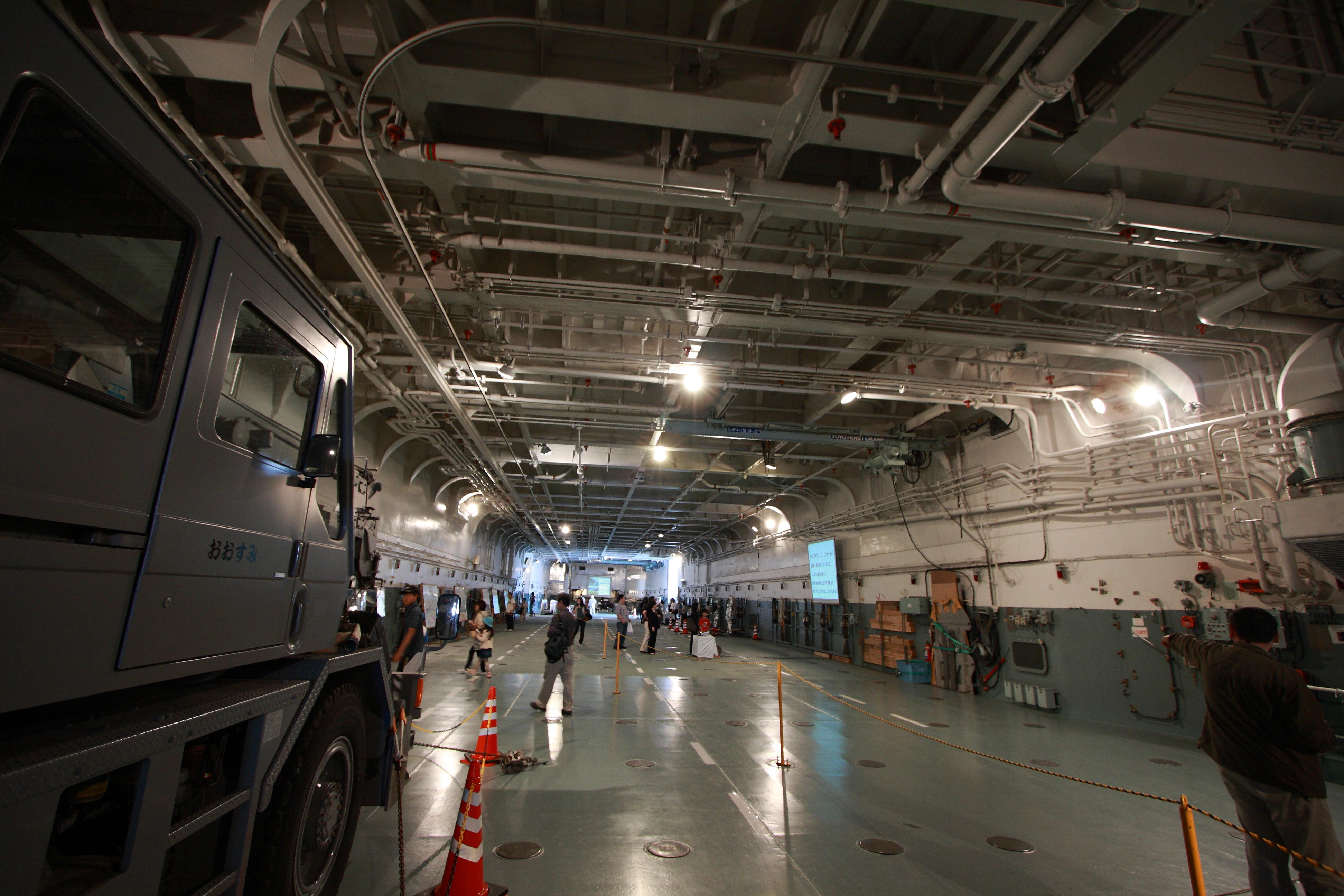 輸送艦おおすみの車両甲板を艦尾側より望む。